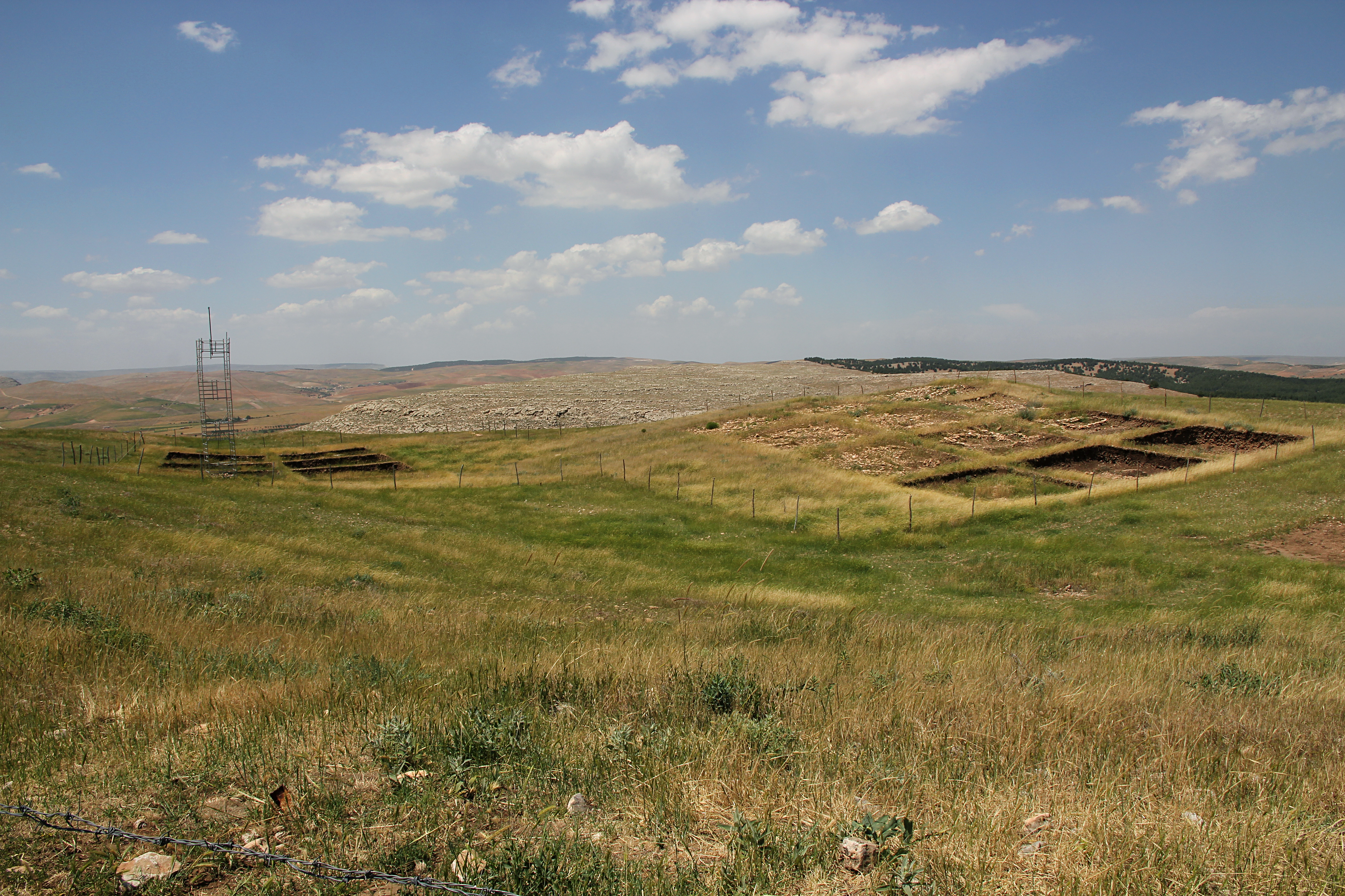 Göbekli Tepe, Siedlungshügel bei Şanlıurfa, Südosttürkei, Sondagen auf dem Nordwesthügel, rechts "Löwenpfeilergebäude"